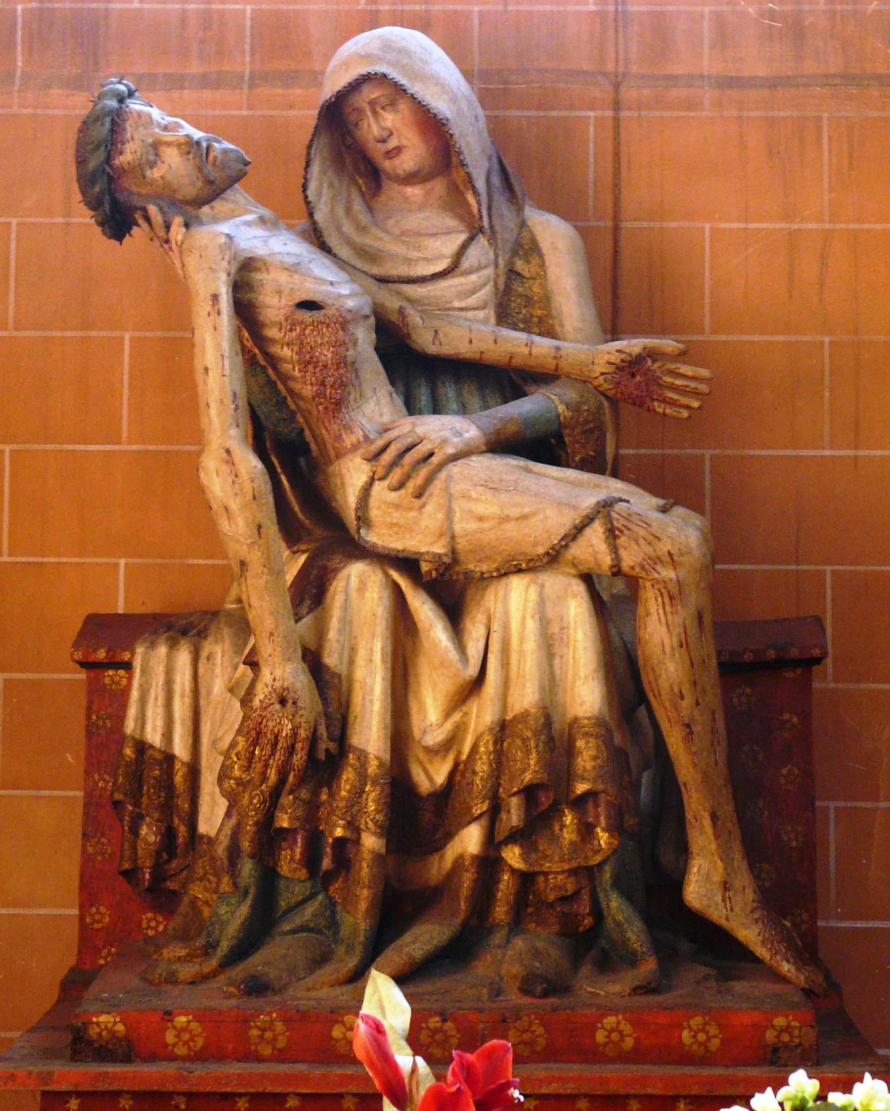 Pieta bzw. Vesperbild im Wetzlarer Dom, Wetzlar (Hessen)